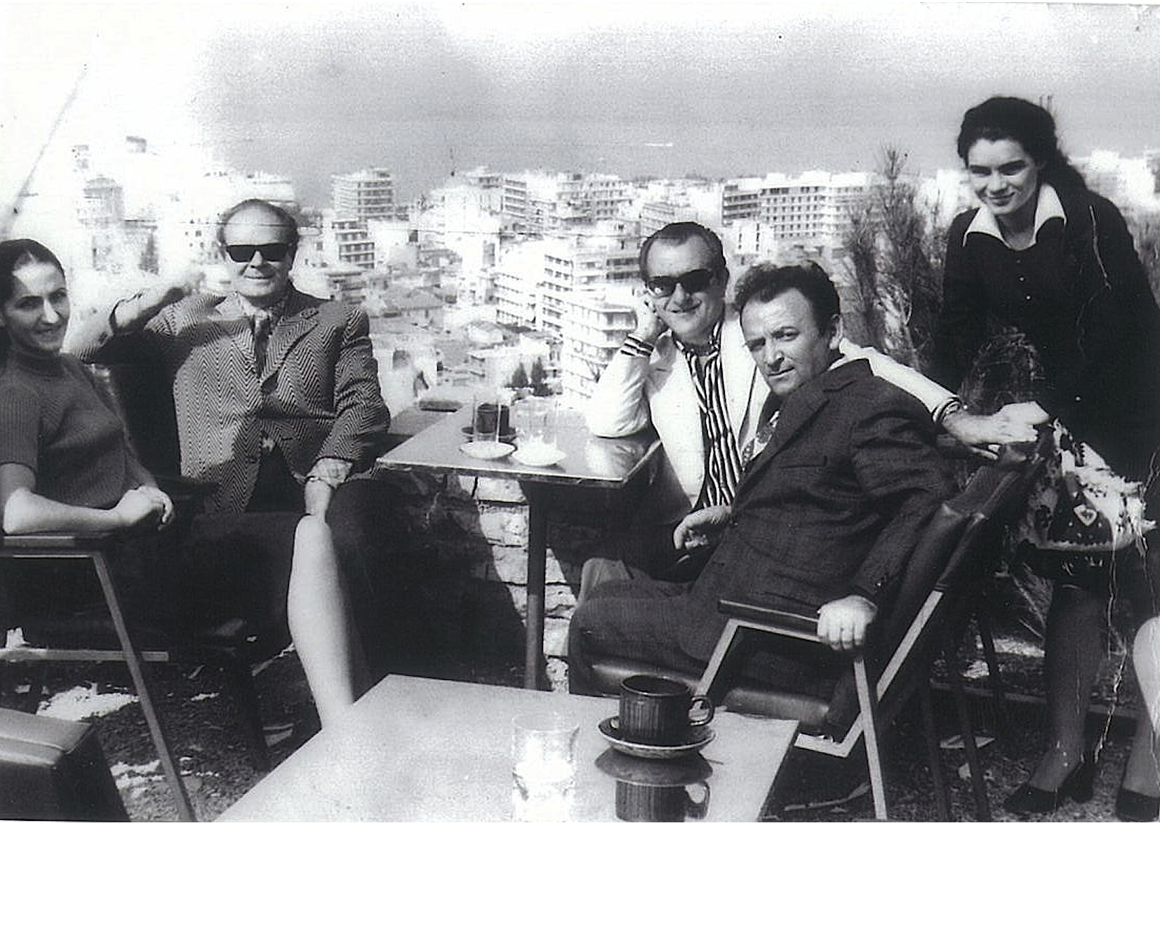 Foto te ndryshme nga jeta e Panajot Kanaçit